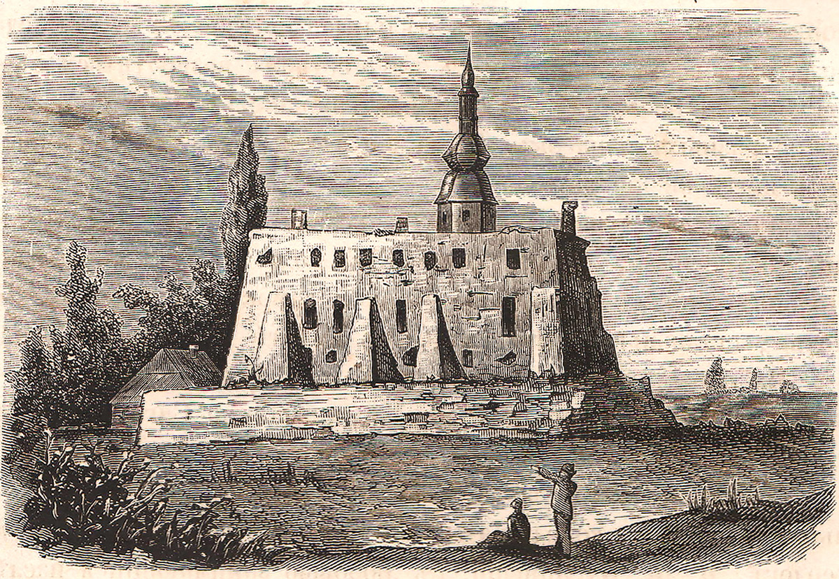 Беларуская (тарашкевіца): Себеж (Siebiež). Замак (?)